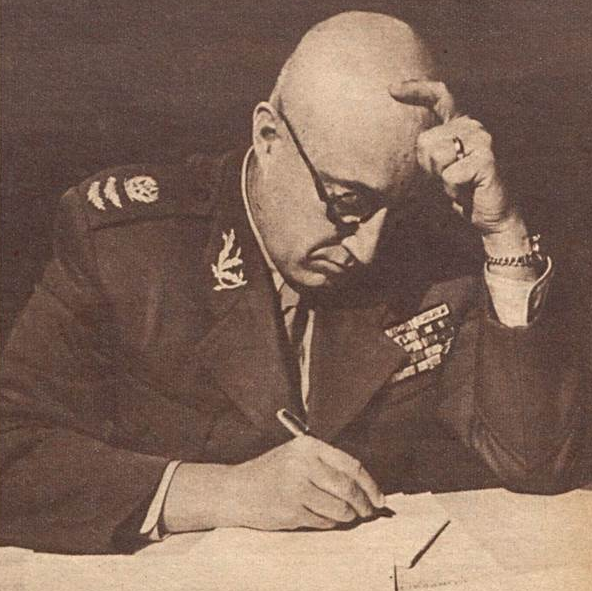 O então general Ângelo Mendes de Morais, delegado militar do Brasil na Conferência de Paris, em 1946.